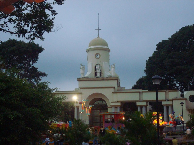 Vista de la Iglesia de San Miguel Arcángel en Escazú durante la celebración patronal de 2011. Costa Rica.